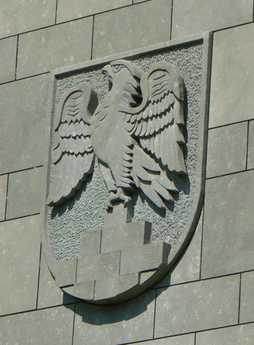 Anröchter Wappen an der Wand des Anröchter Rathauses (neuer Trakt)